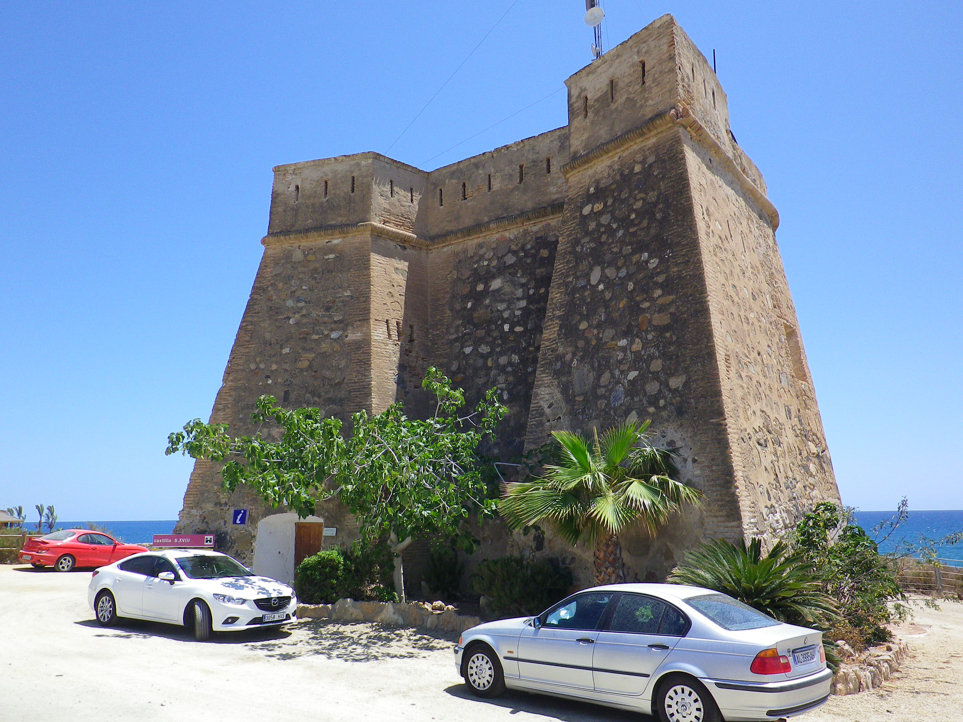 Fotografía de la Torre de Cristal, torre de defensa costera tipo pezuña o herradura, situada en Villaricos, municipio de Cuevas del Almanzora, provincia de Almería, España.